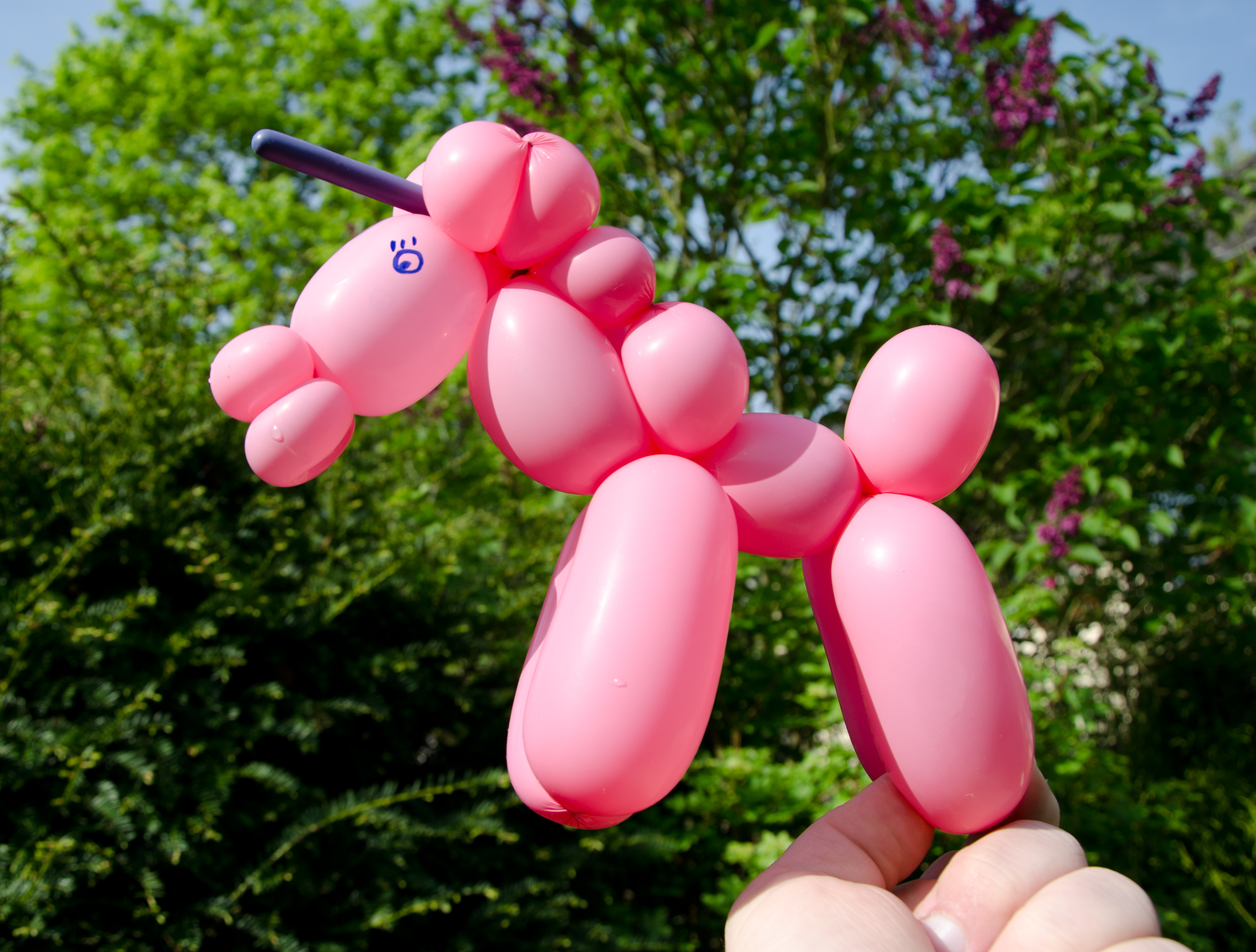 rosa Einhorn aus Luftballons- angefertigt vom Ballonkünstler Tom Bola